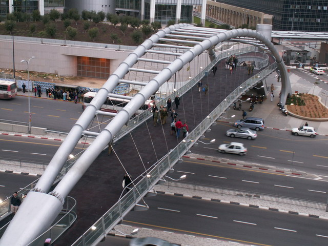 מרכז עזריאלי ת"א Azriely Towers - Tel-Aviv - Israel צולם על-ידי אבי קדמי ב- 2006.